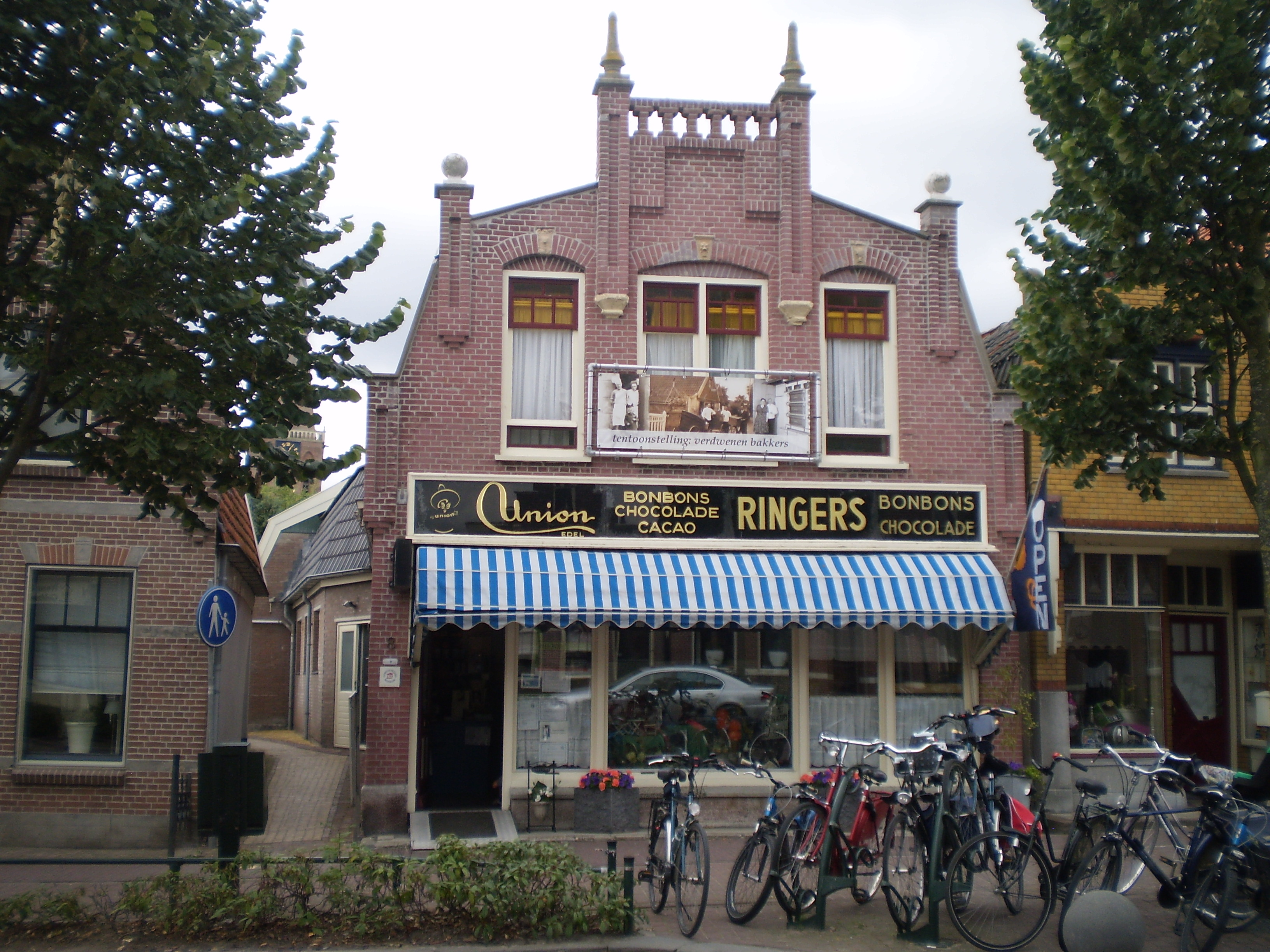 Bakkerijmuseum De Alde Bakkerij.